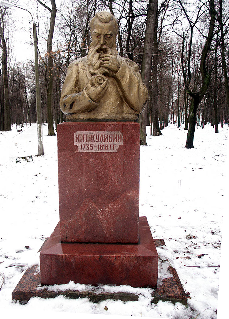 Россия: Нижний Новгород: Нижегородский район: ул.Максима Горького: парк им.Кулибина: Кулибин; 13:59 03.01.2007